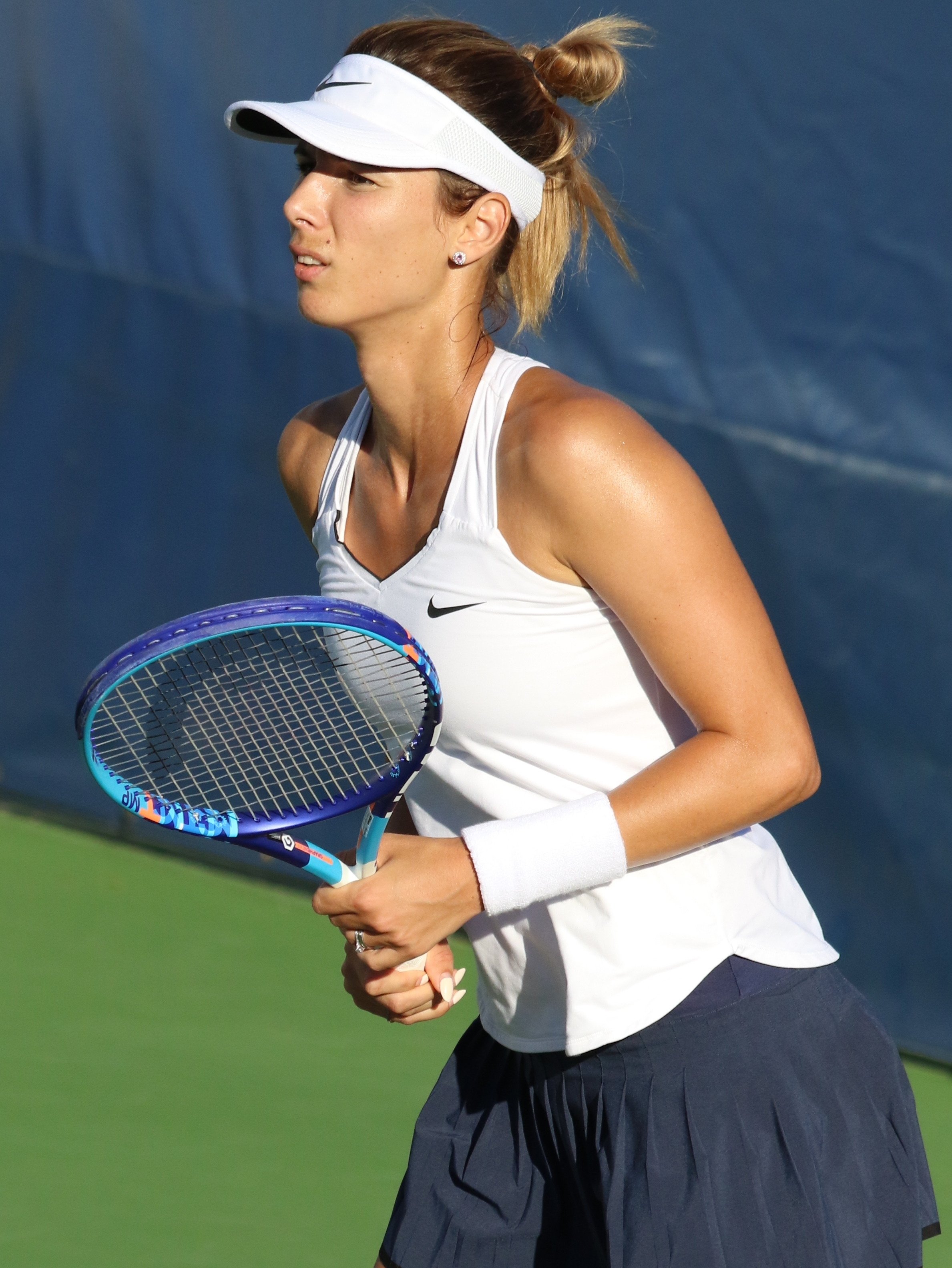 Pironkova US16 (7)